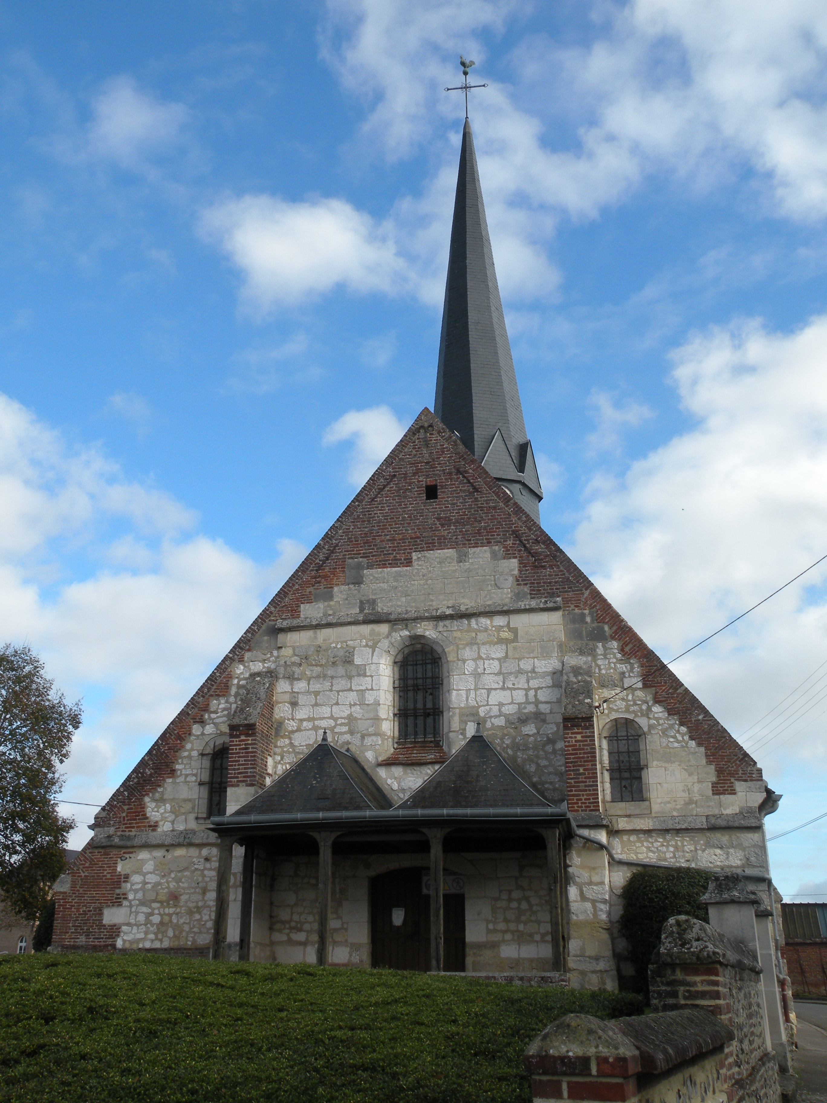 église Saint-Nicolas de Lafraye